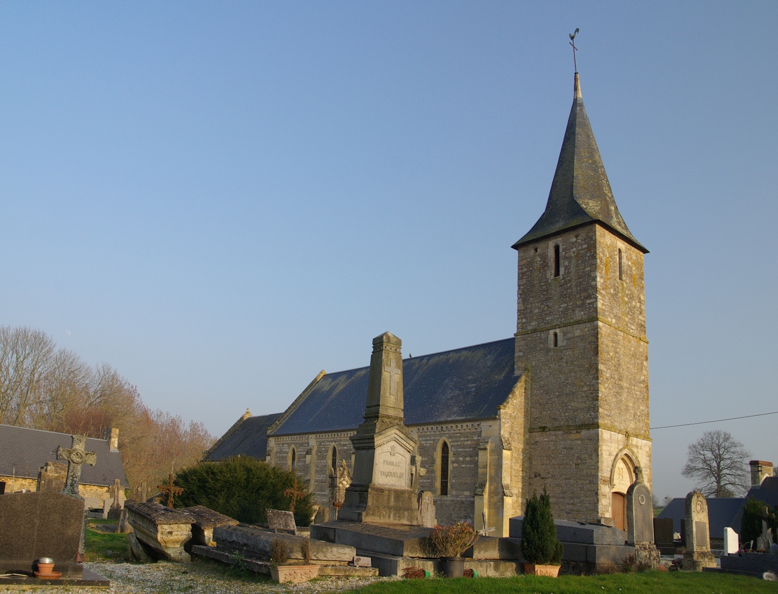 L'église Saint-Sulpice, Maisoncelles s/Ajon, Calvados.